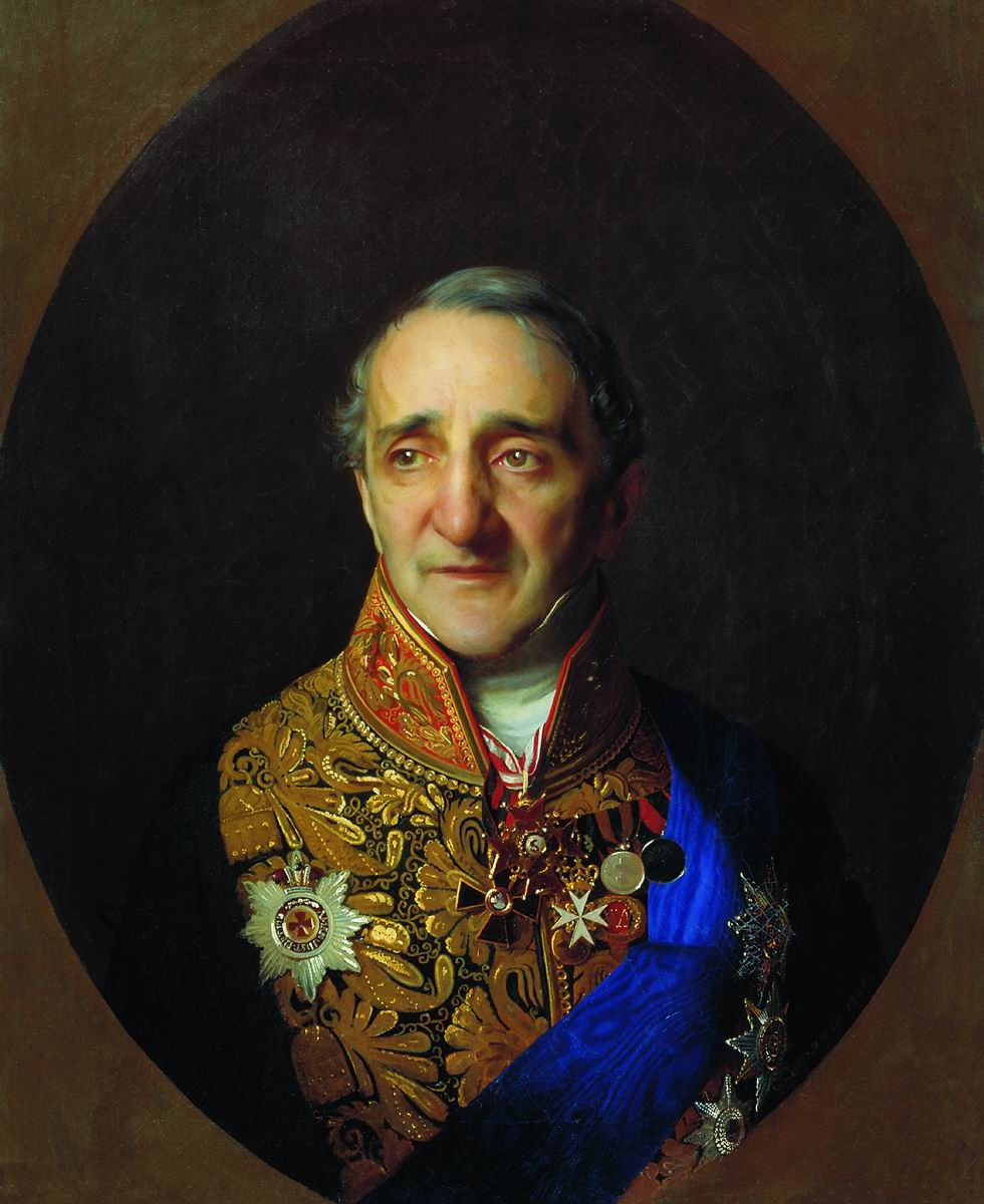 Портрет камергера, действительного статского советника Христофора Екимовича (Иоакимовича) Лазарева 1851